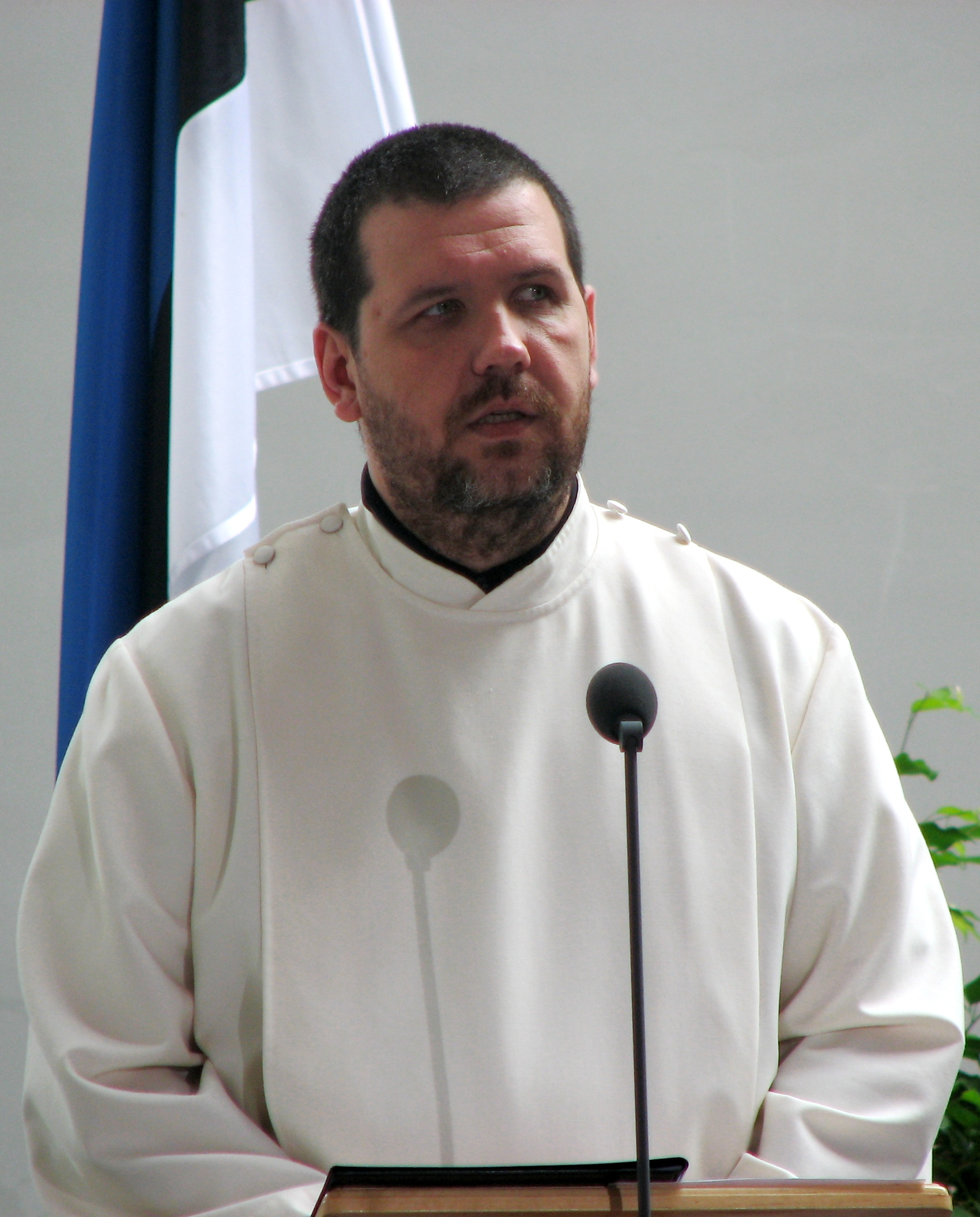 Eerik Jõks teenimas nelipüha oikumeenilisel jumalateenistusel Harkujärve Stefanose Kirikus